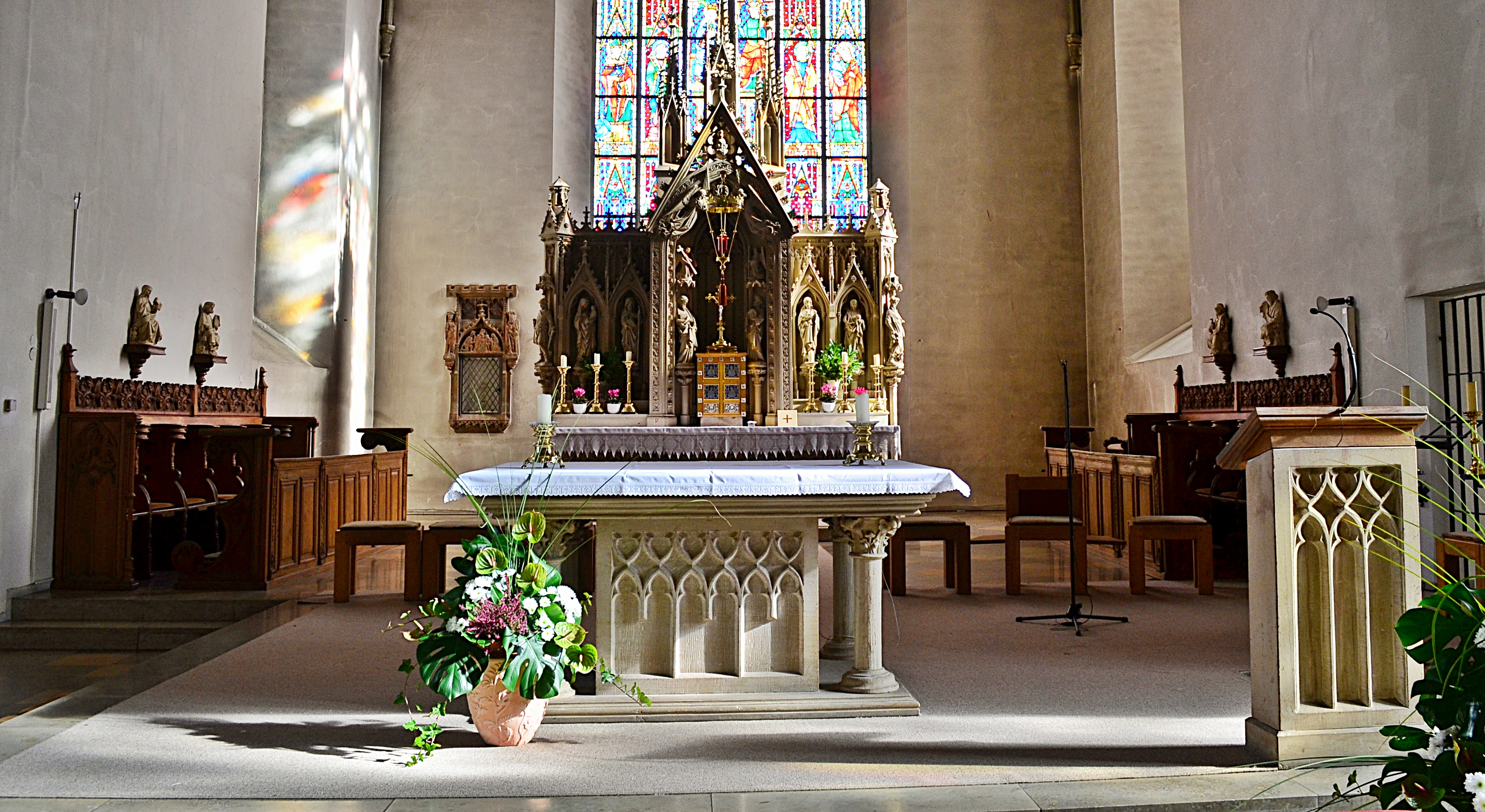 Brilon, der Altarraum mit Zelebrations- und Hauptaltar